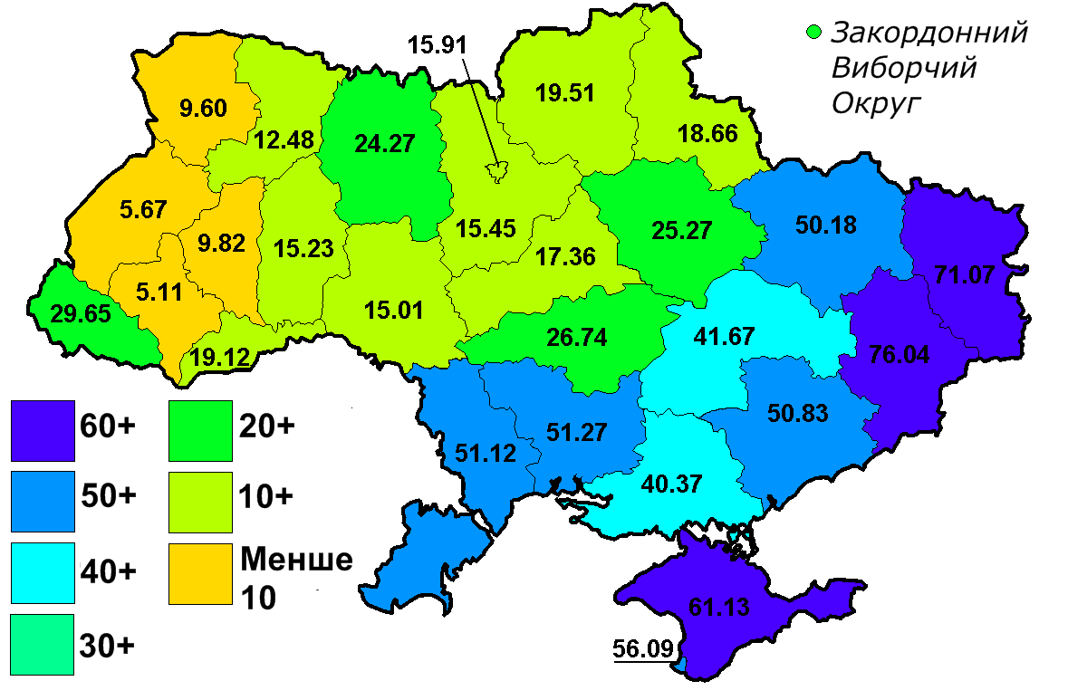 Результат Віктора Януковича на виборах Президента України 2010. І тур.